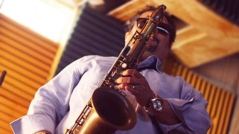 Sandy Gabriel en sesión de estudio durante la grabación de la banda sonora para el comercial de Hipermercados Olé.